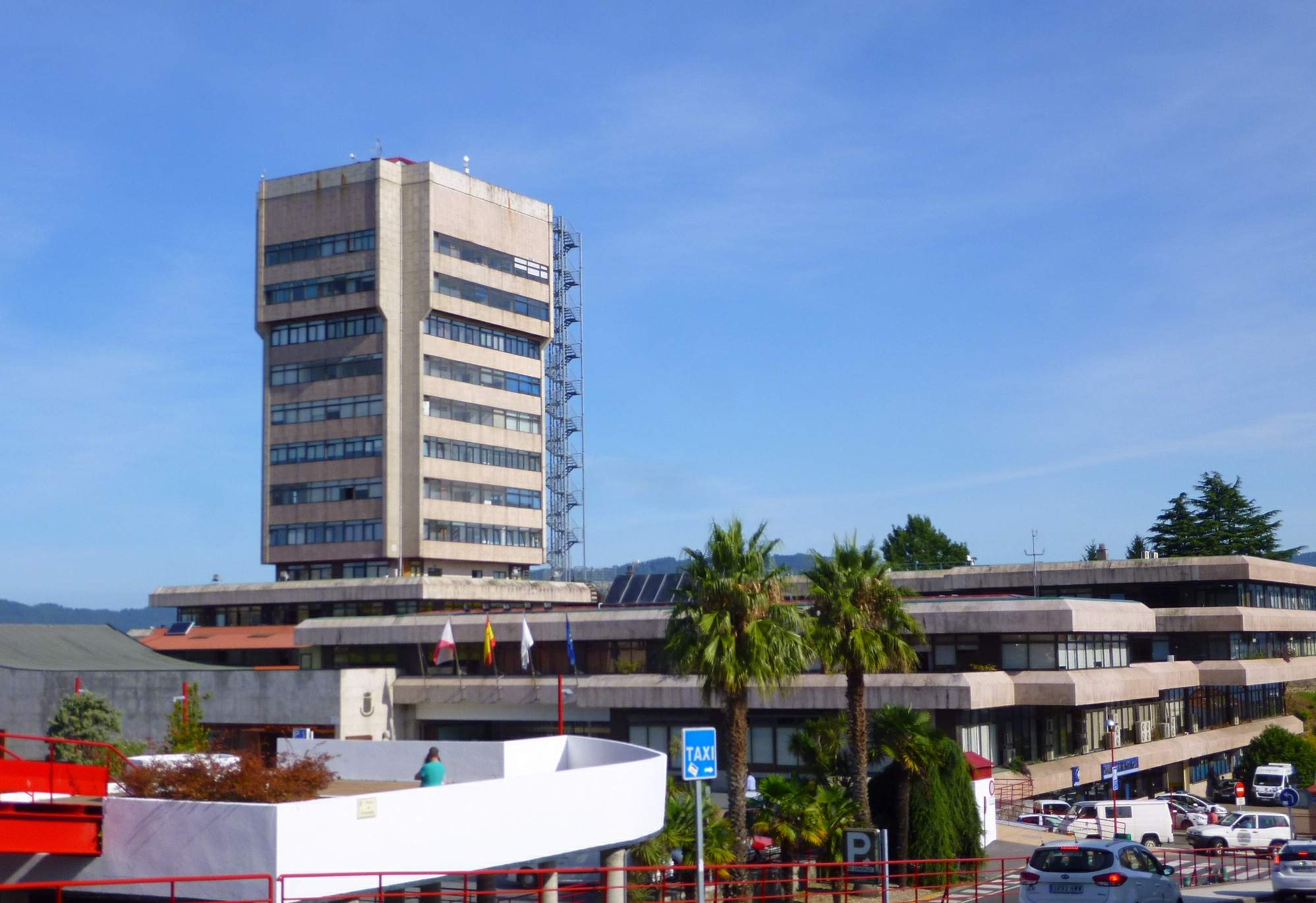 Vigo - Concello (Ayuntamiento)